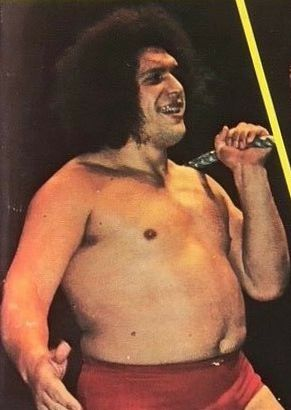 André le Géant en couverture du magazine de catch Wrestling Yearbook n.12 en 1975